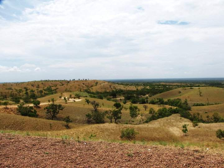 Parque nacional Aguaro-Guariquito, estado Guárico - Venezuela (2009)